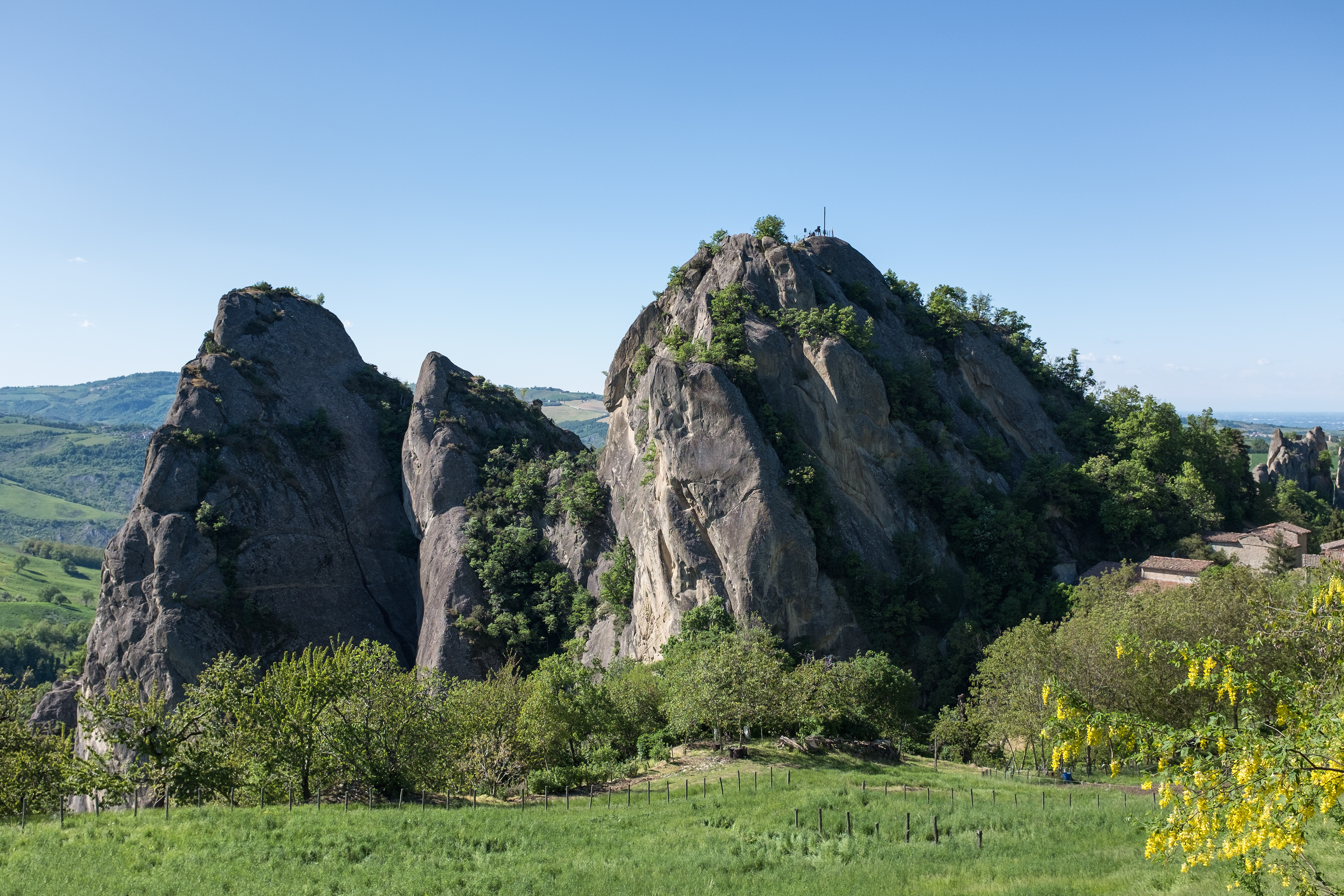 Sassi di Roccamalatina - Guiglia, Modena, Italia